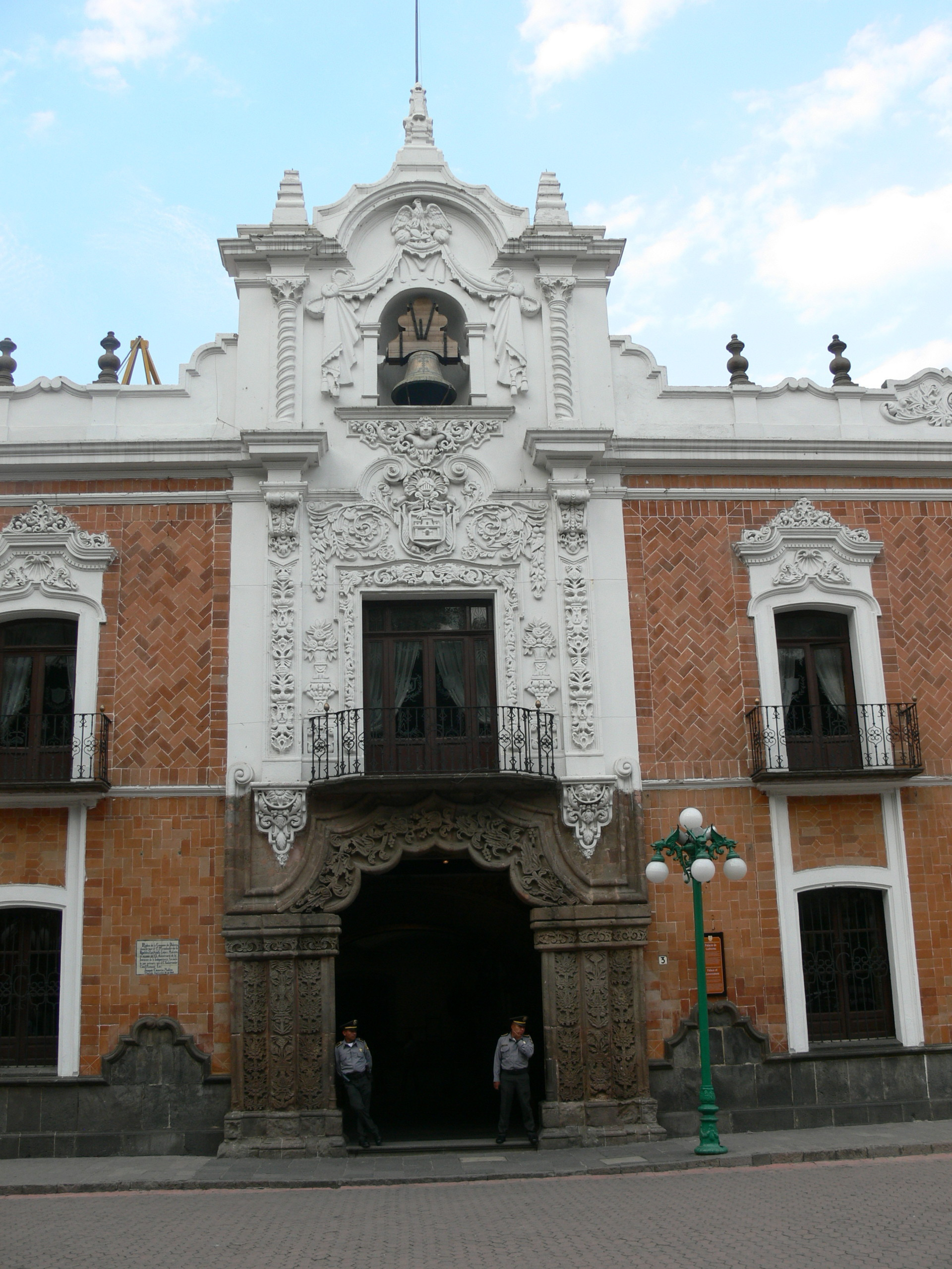 Tlaxcala City. Palacio de Gobierno - Fassade.